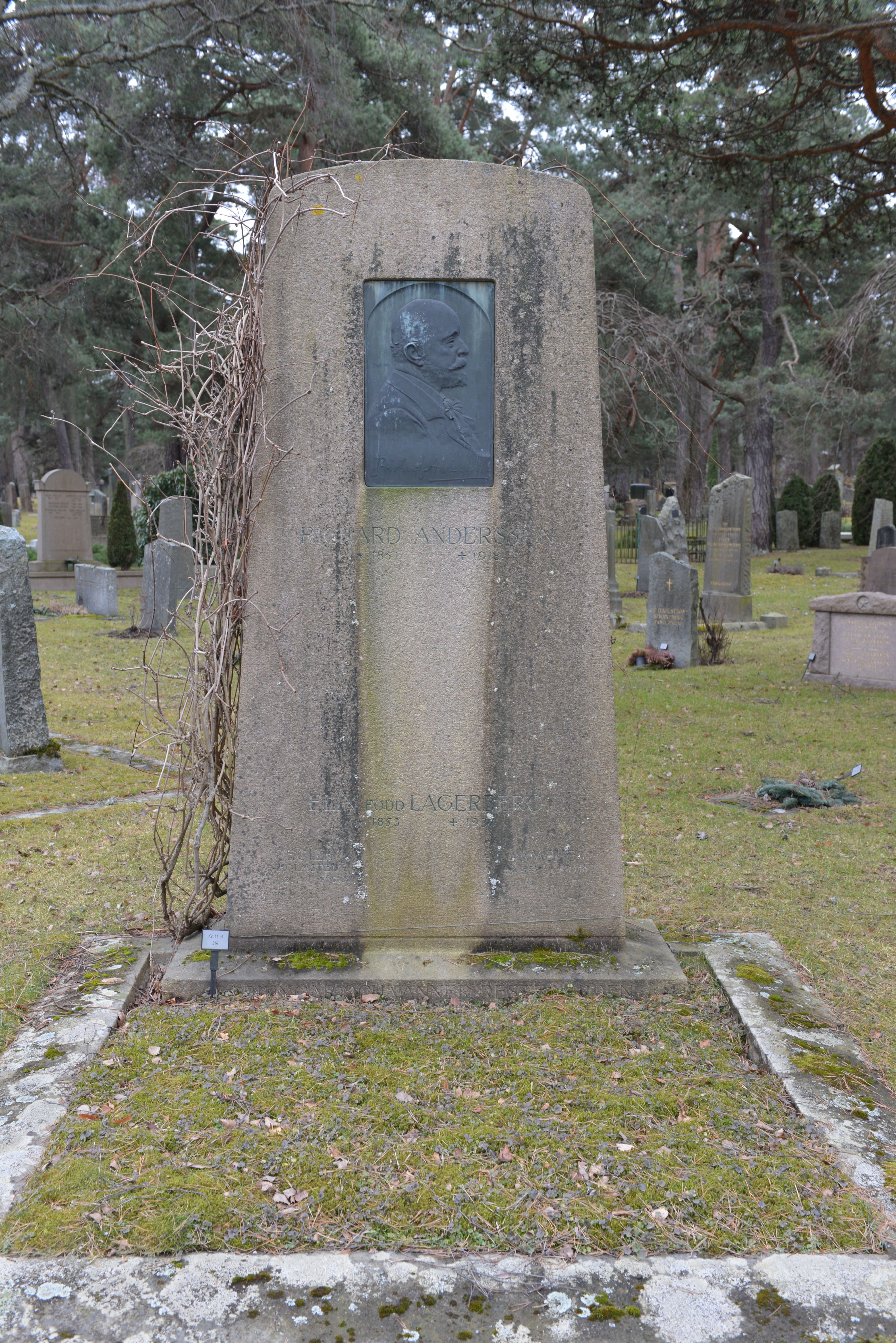 Richard Anderssons gravsten. Konstnär John Runer 1920.